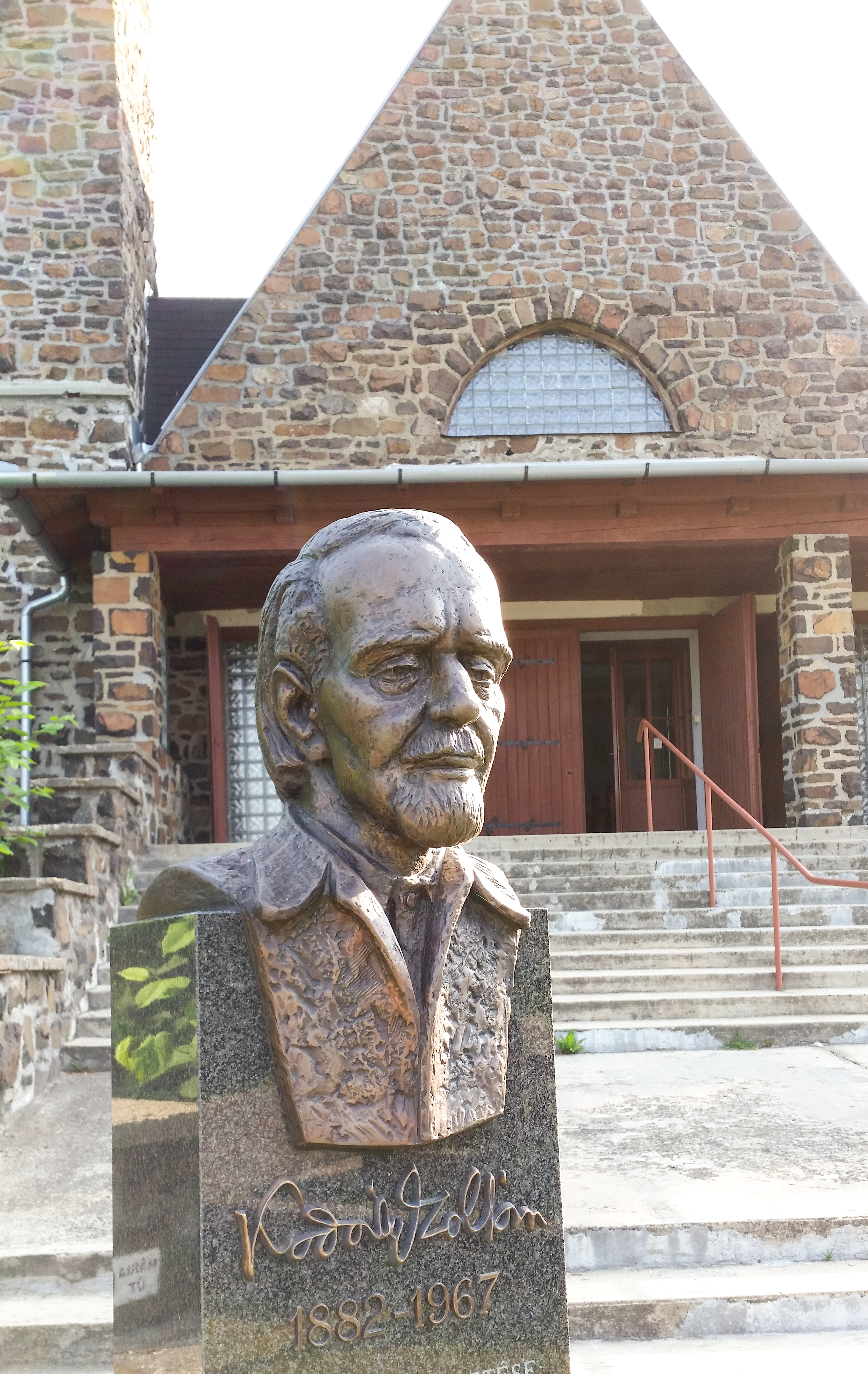 Bust of Kodály at the church in Galyatetőlabel QS:Len,"Bust of Kodály at the church in Galyatető" label QS:Lhu,"Kodály mellszobra a galyatetői templomnál"